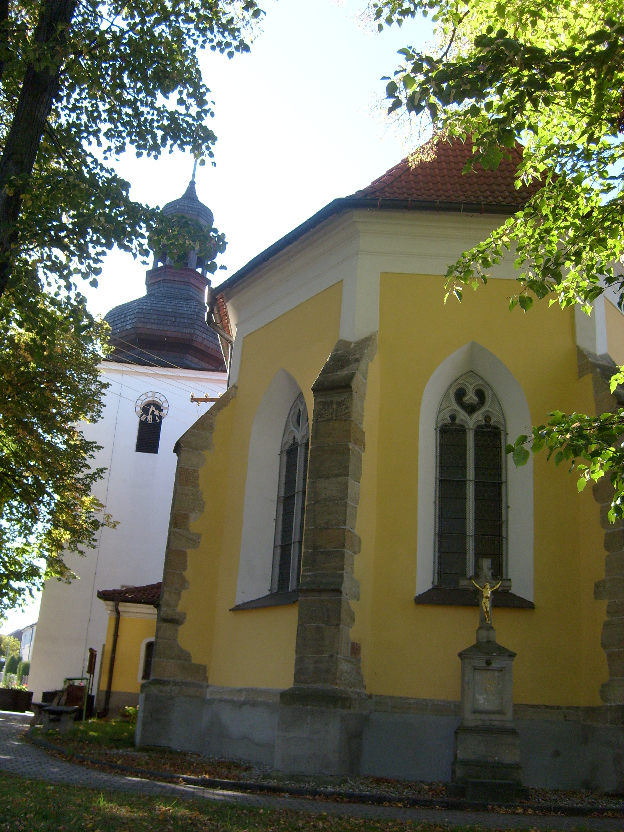 Kostel v Licibořicích, Chrudim District, Pardubice Region, Czech Republic